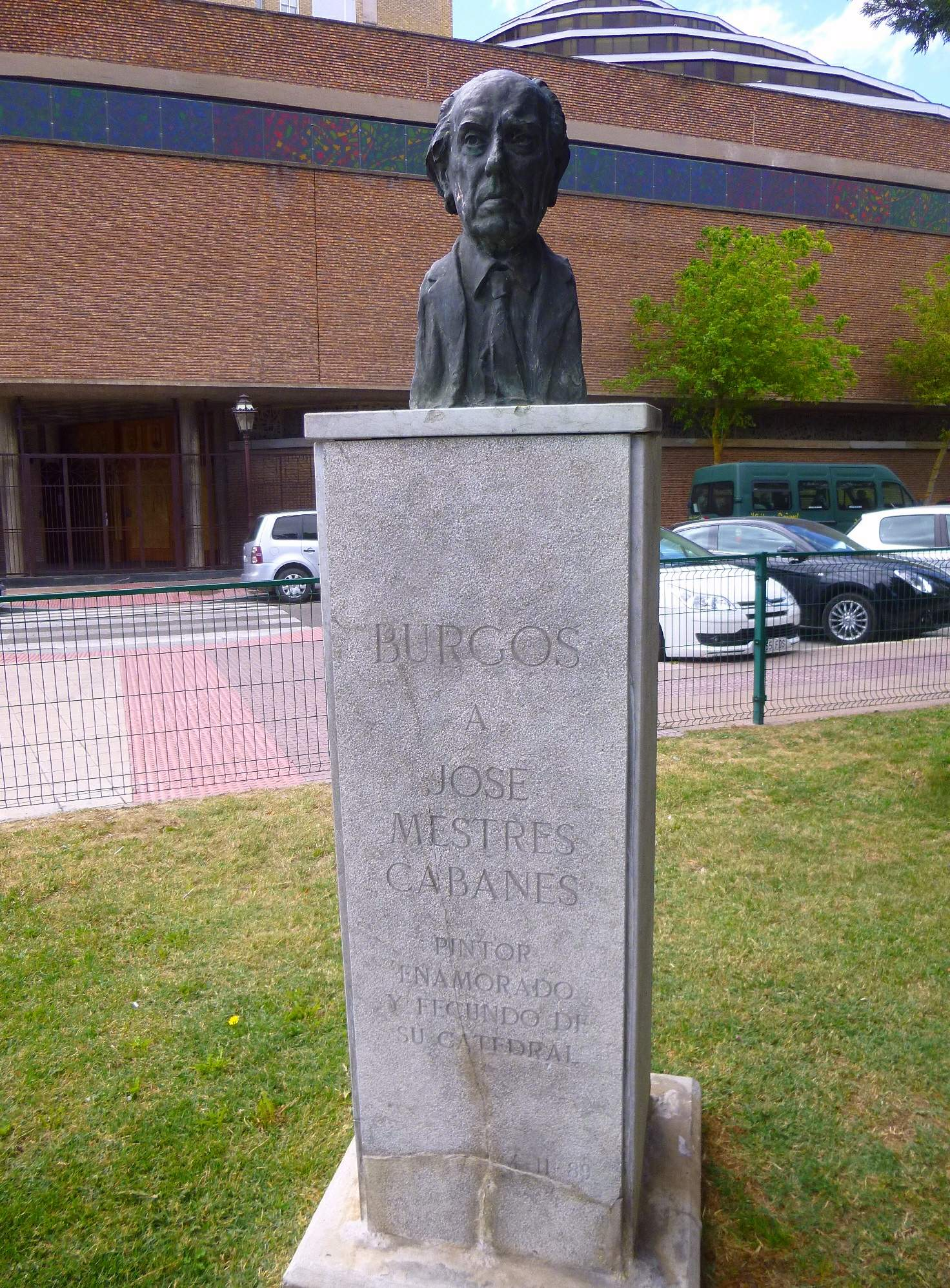 Burgos - Monumento a José Mestres Cabanes